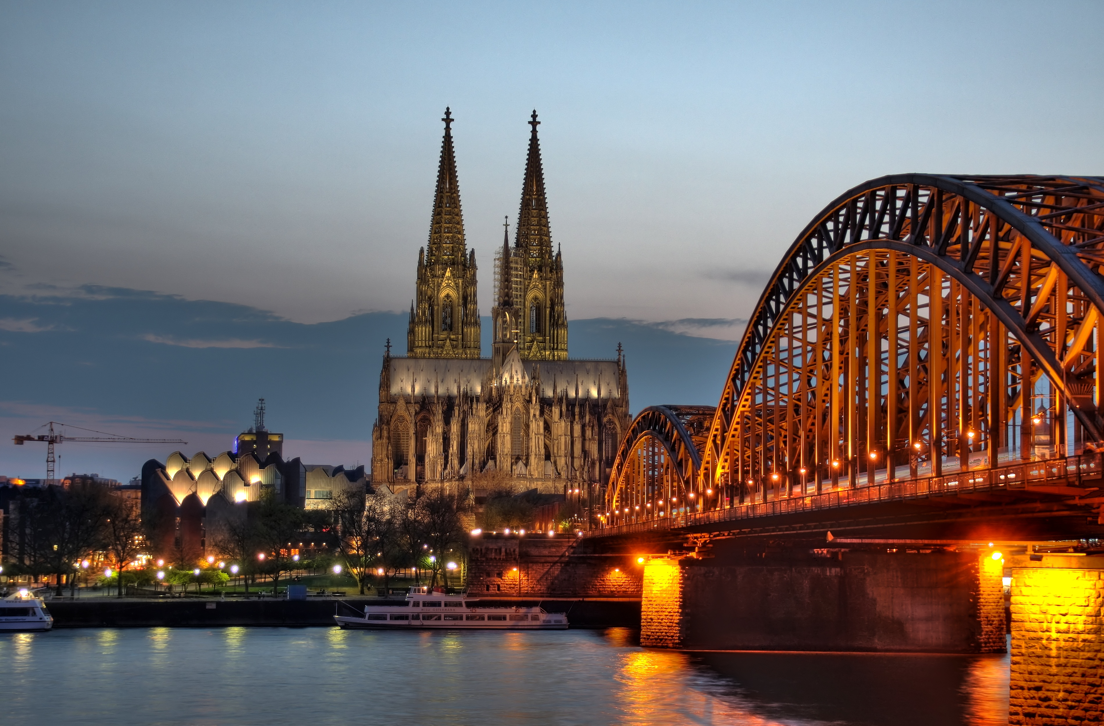 Kölner Dom Ostseite und Hohenzollernbrücke in der Abenddämmerung